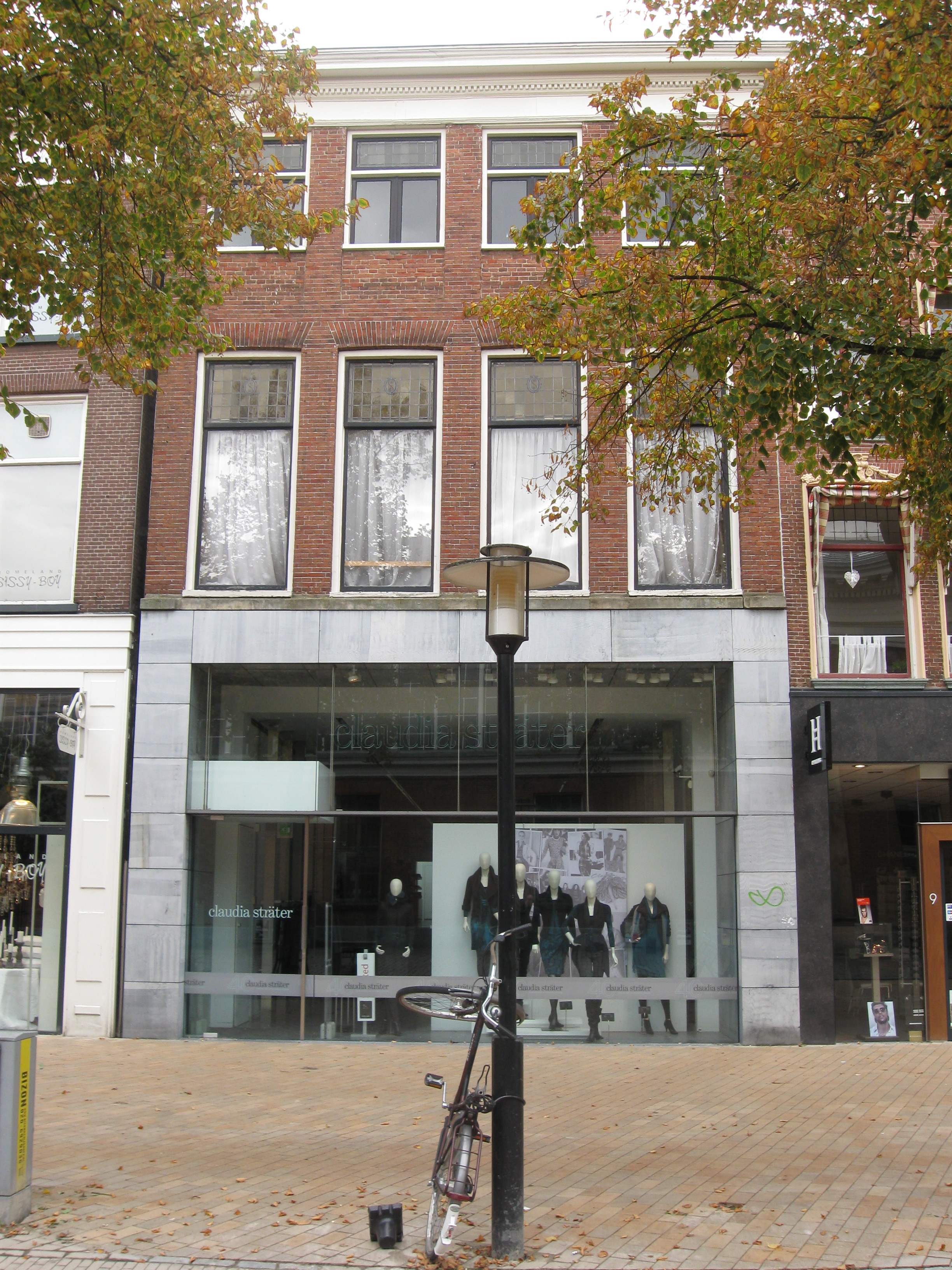 Groningen, Akerkhof 11, Pand met vier traveeën, middeleeuwen